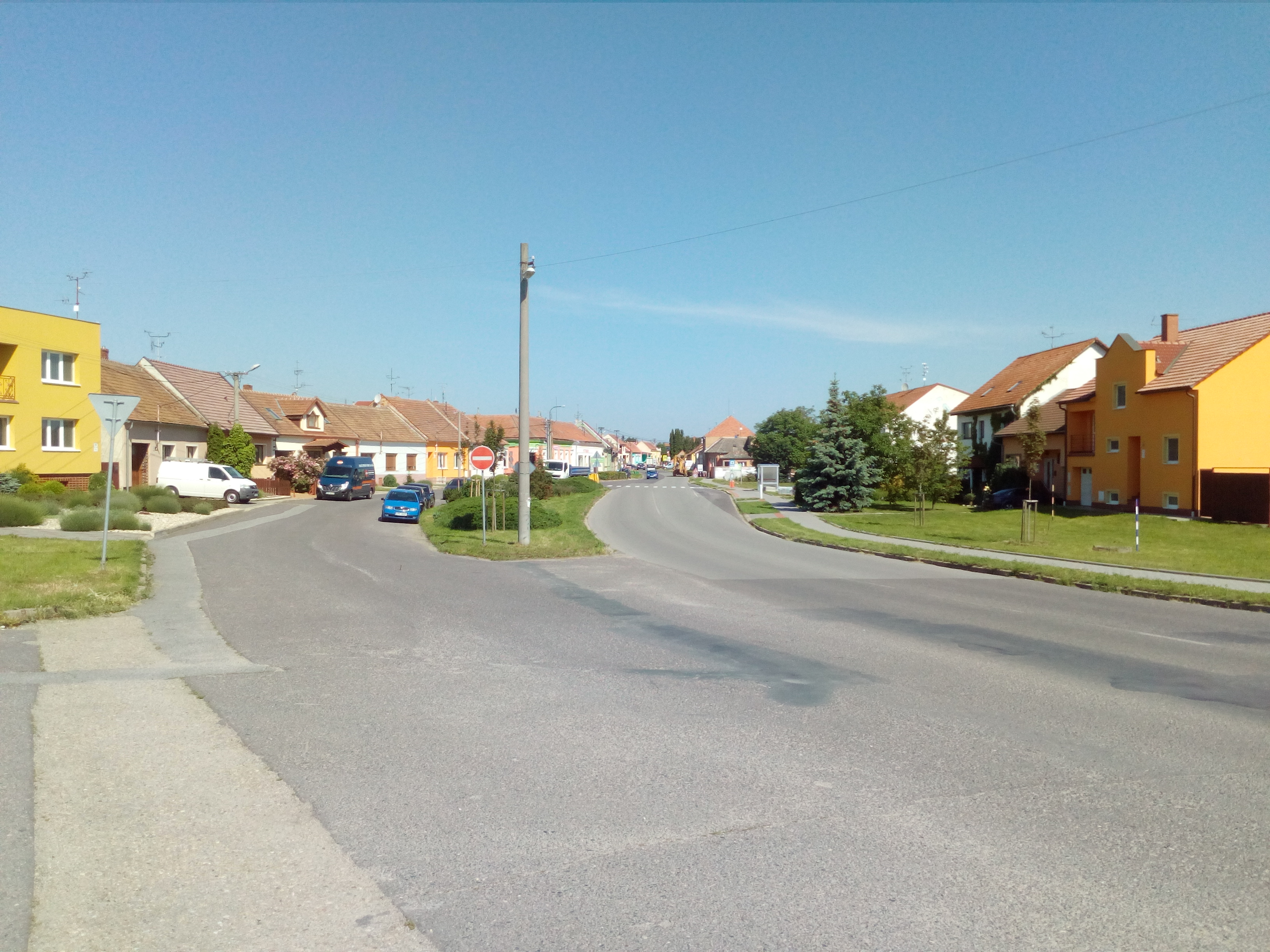 Hlavní silnice v Charvátské Nové Vsi, část obce dříve zvaná "Malá Poštorná"